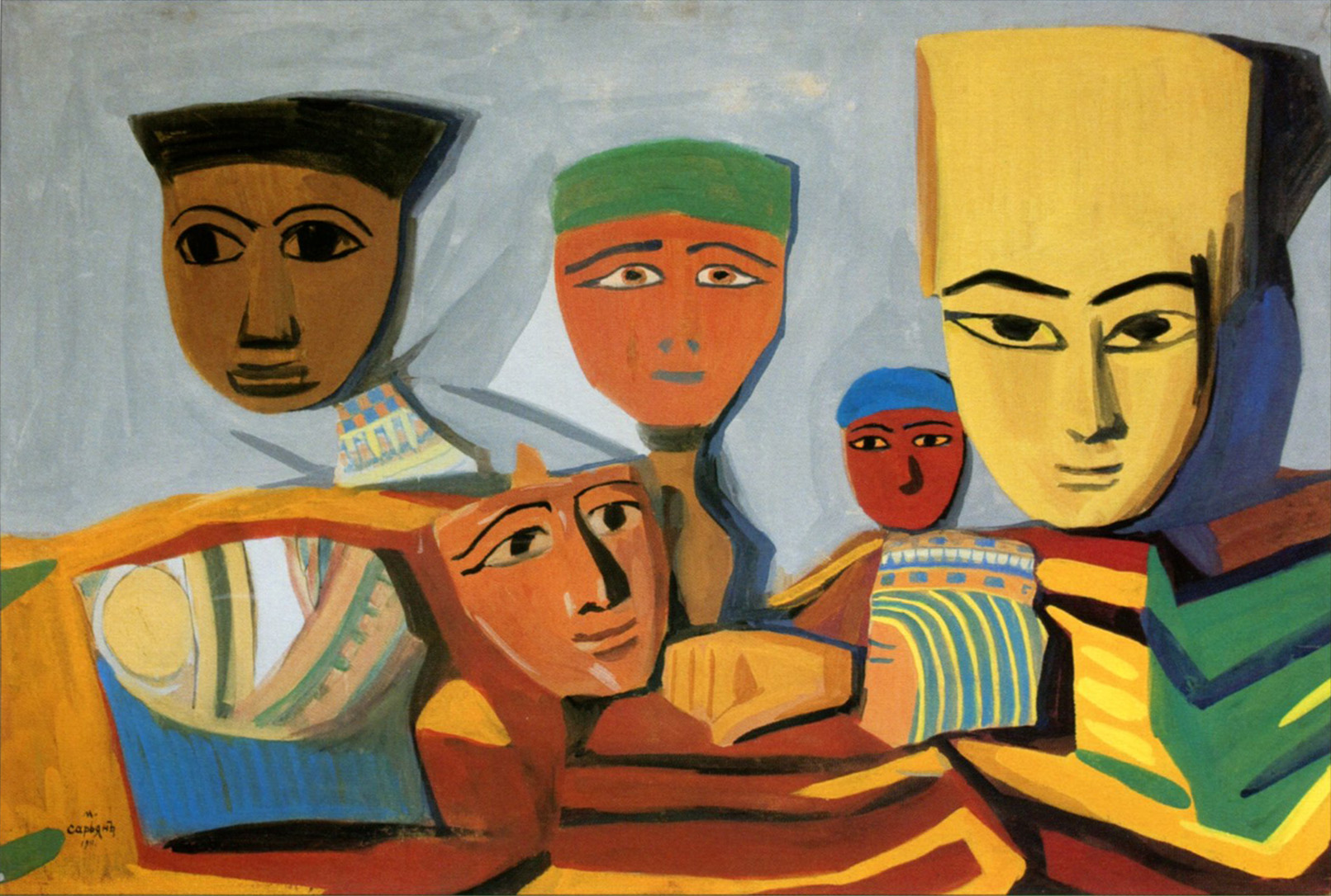 Египетские маски